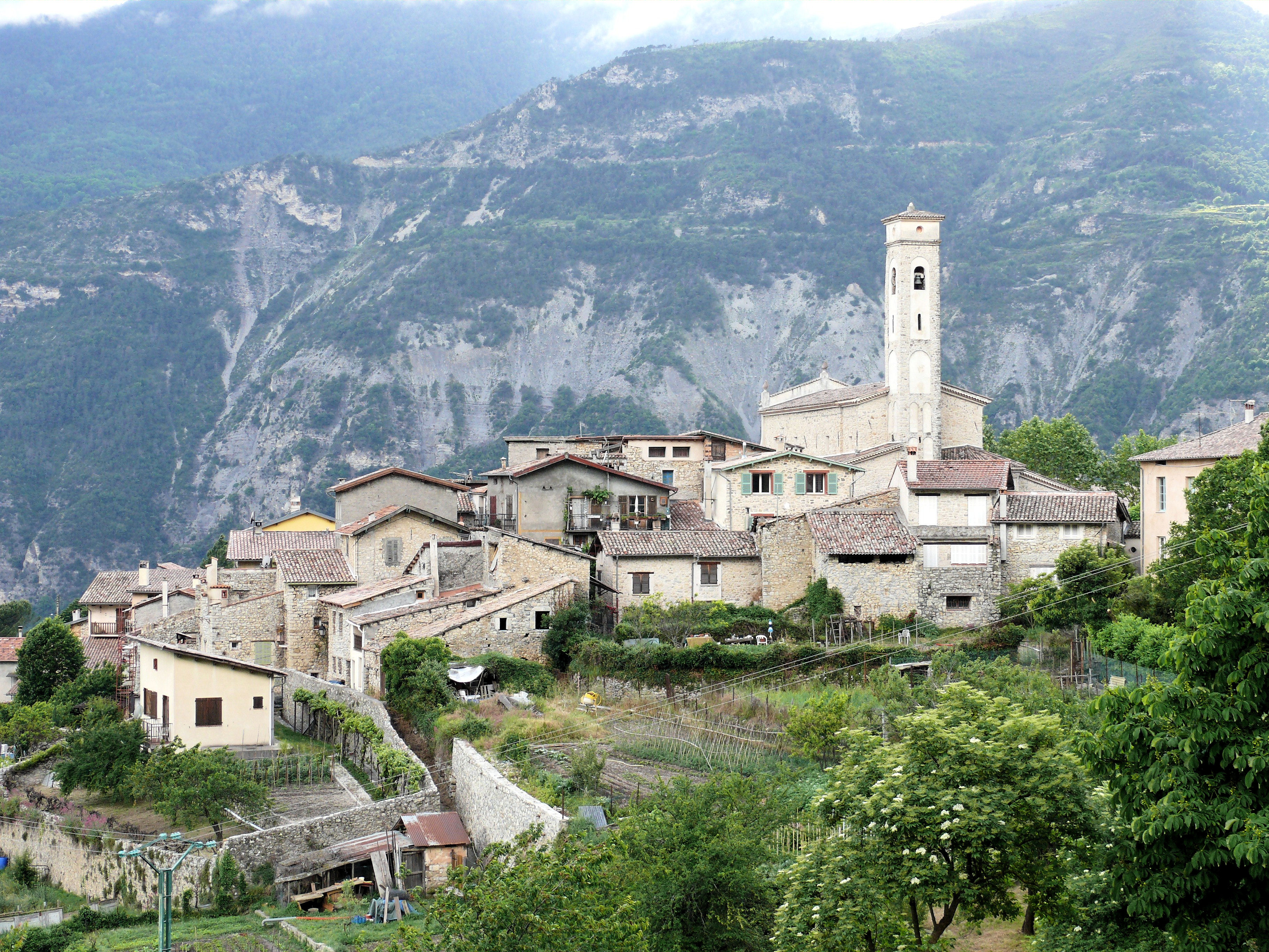 Clans (Alpes-Maritimes) - Le village